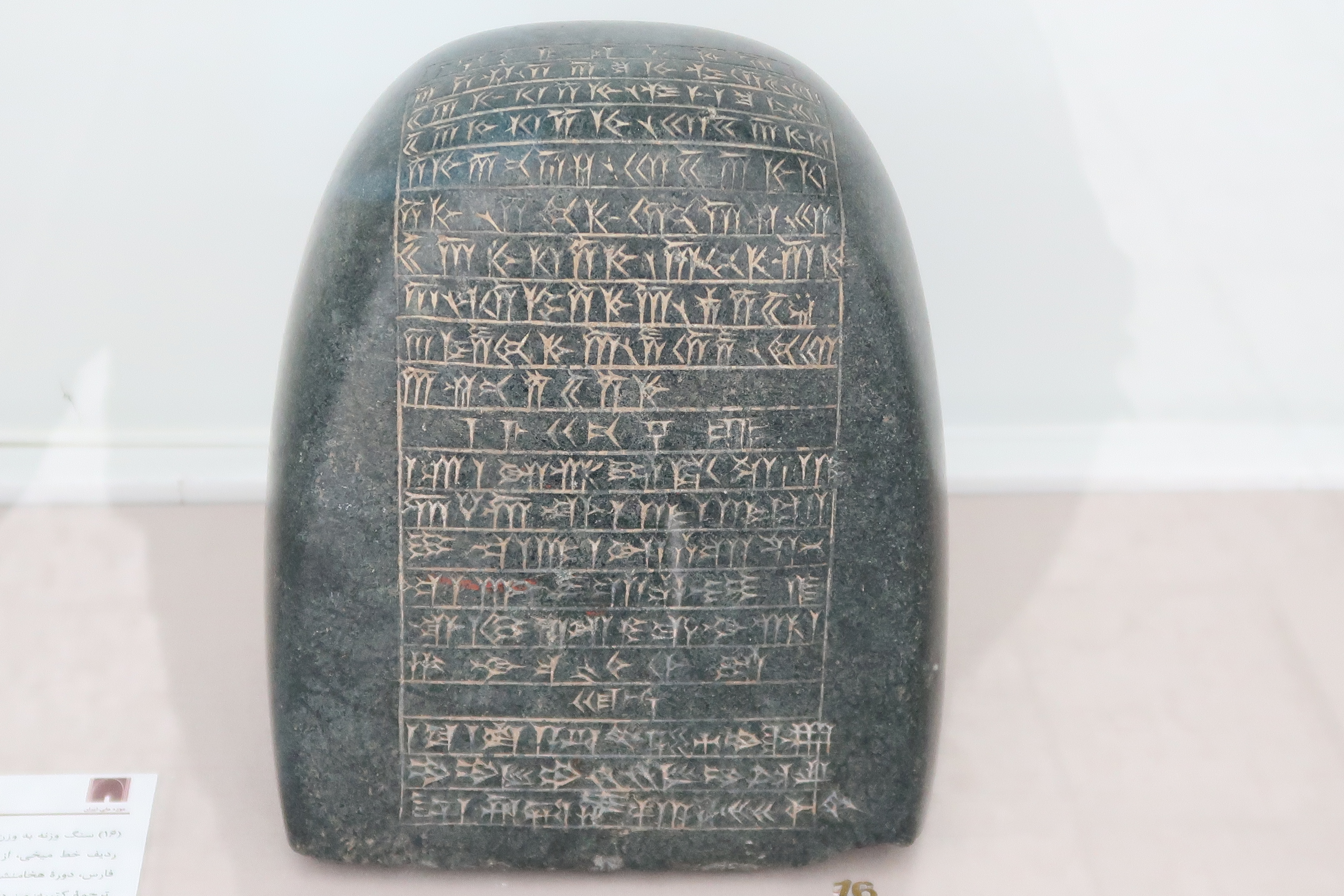 سنگ وزنه دوره داریوش هخامنشی به وزن 9950 گرم . موزه ایران باستان. با کتیبه به سه زبان فارسی باستان و عیلامی و بابلی .